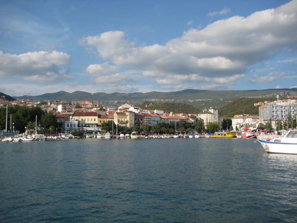 Crikvenica s rive, Croatia